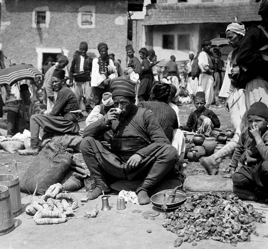 Bosna - tržiště, prodavač fíků